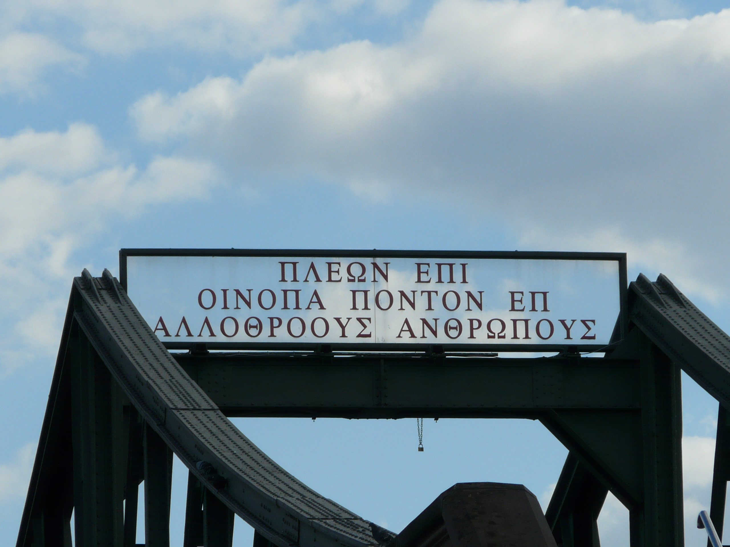 Griechische Inschrift am eisernen Steg in Frankfurt/Main